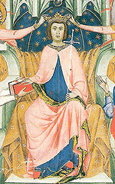 Jaume II de Mallorca jura els privilegis del regne de Mallorca el 1276. Miniatura pintada per Romeu Despoal (representat a baix) vers 1334 al Llibre de privilegis dels reis de Mallorca (Arxiu Històric Municipal de Palma)